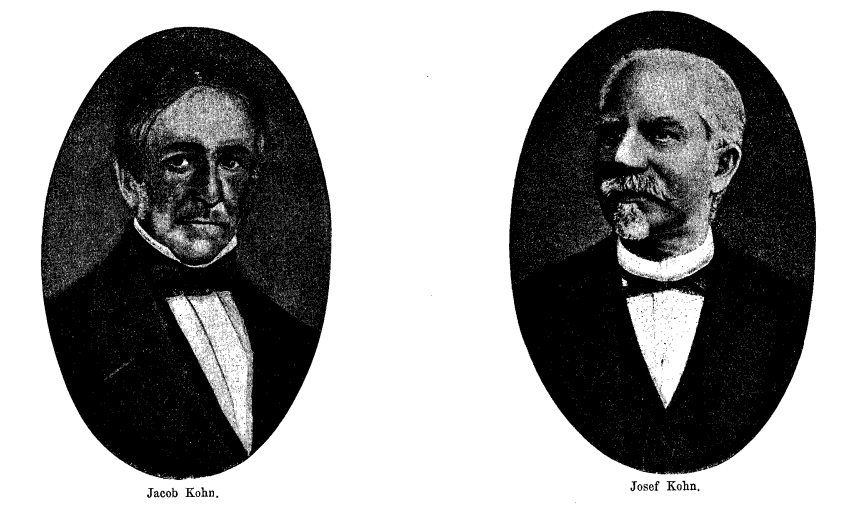 Jacob & Josef Kohn in der Wiener Zeitung